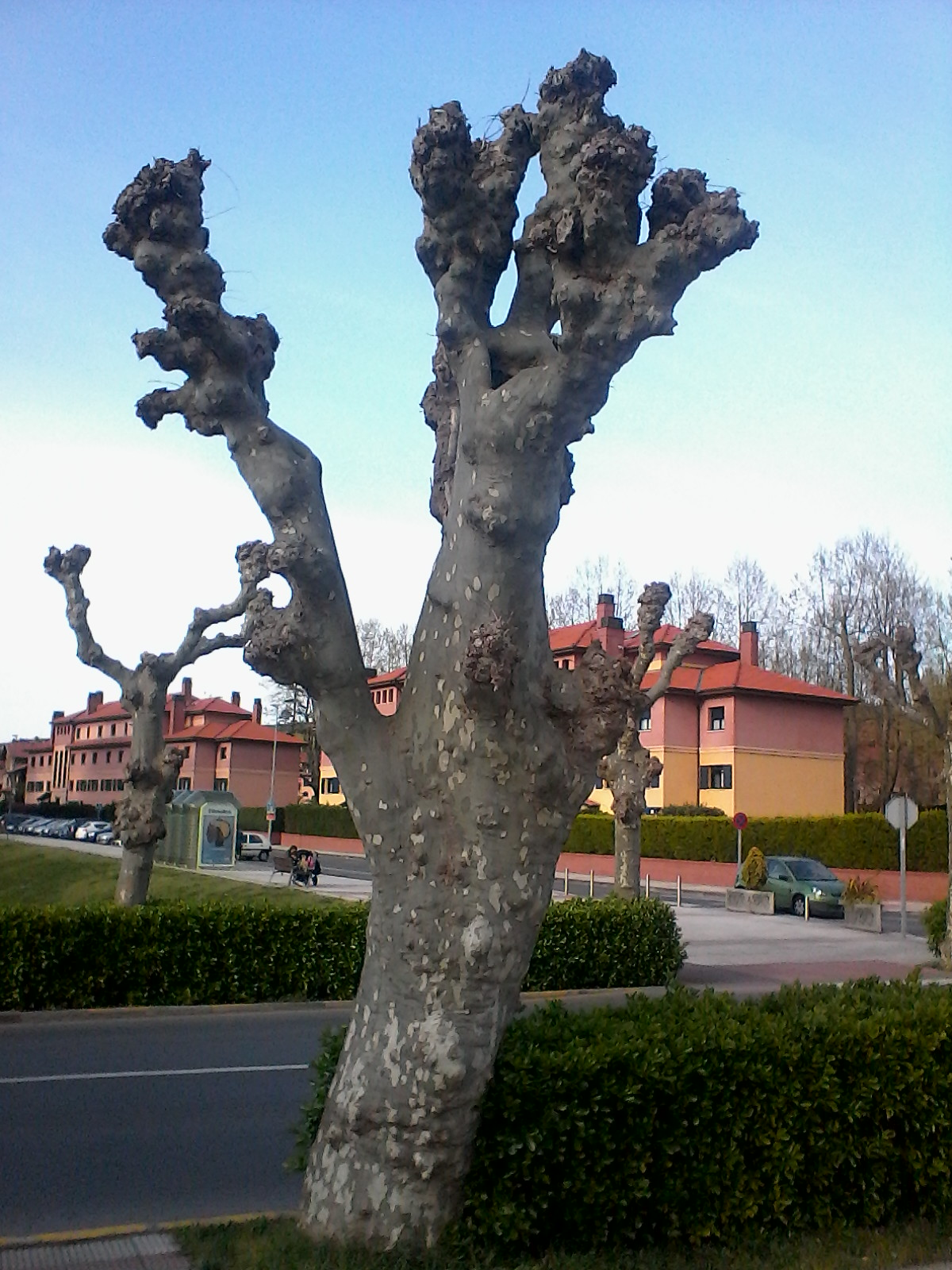 Plátanos (Plátanus x hispánica) en la localidad de Berango, Vizcaya, España. Se mantienen en un tamaño reducido mediante podas anuales cuya finalidad es evitar que las raíces causen destrozos en el entorno. El uso de este híbrido como árbol de sombra, así como la poda de origen agrícola que recibe (similar a la aplicada a parras y árboles frutales), son comunes en toda España.